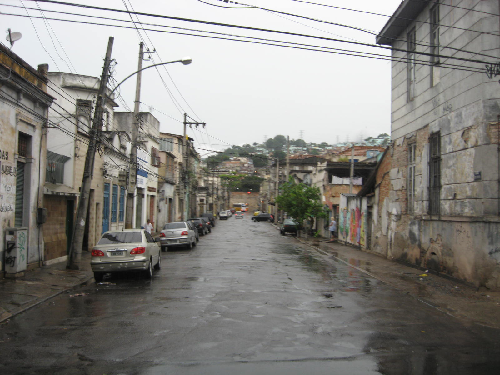 Vista do bairro Estácio, no Rio de Janeiro.